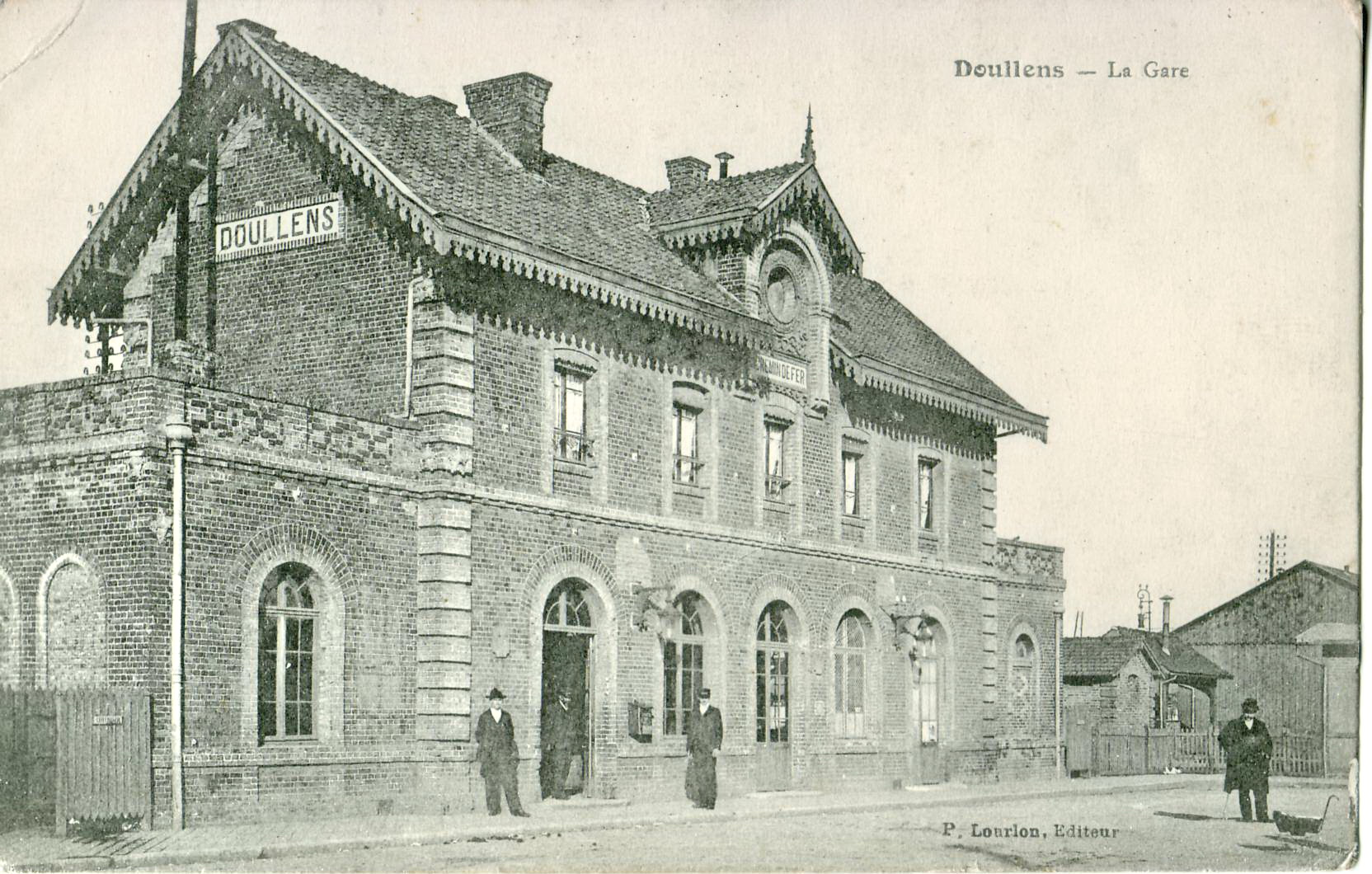 Carte postale ancienne éditée par LourlonDOULLENS : La Gare